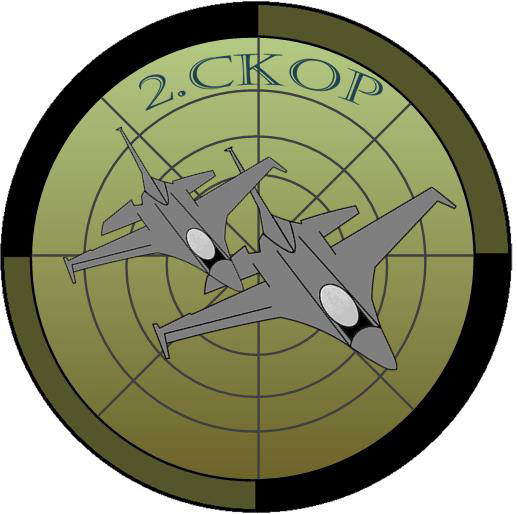 2. Centrum Koordynacji Operacji Powietrznych – oznaka rozpoznawcza na mundur polowy – 2019, Polska.